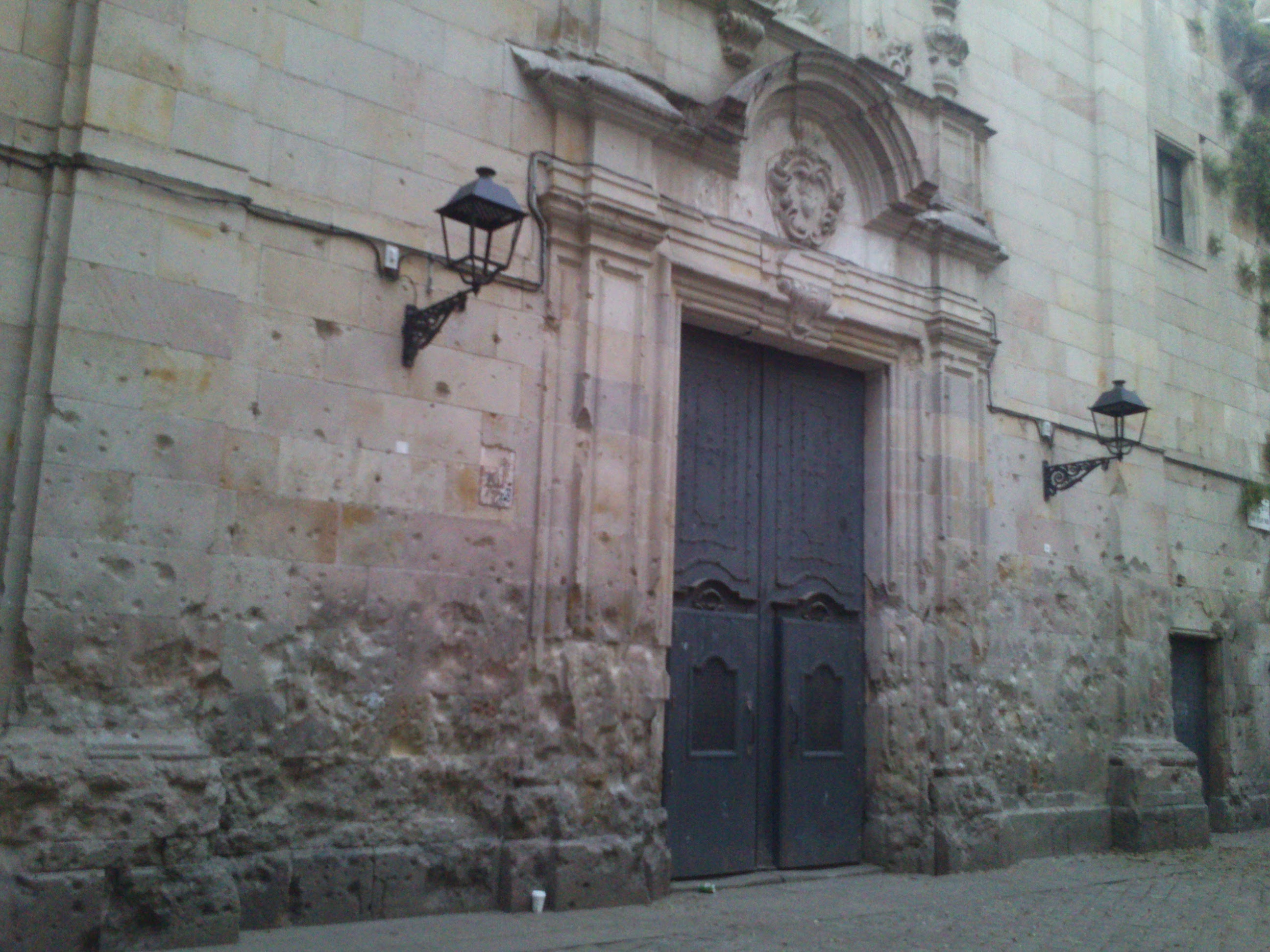 Fachada de la Iglesia de San Felipe (Barcelona). Se ven claramente los impactos de metralla del bombardeo que perpetuó la aviación franquista el 30 de enero de 1938, en el marco de la Guerra Civil Española.